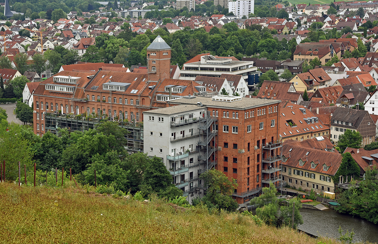 Bissinger Rommelmühle von Nordwesten